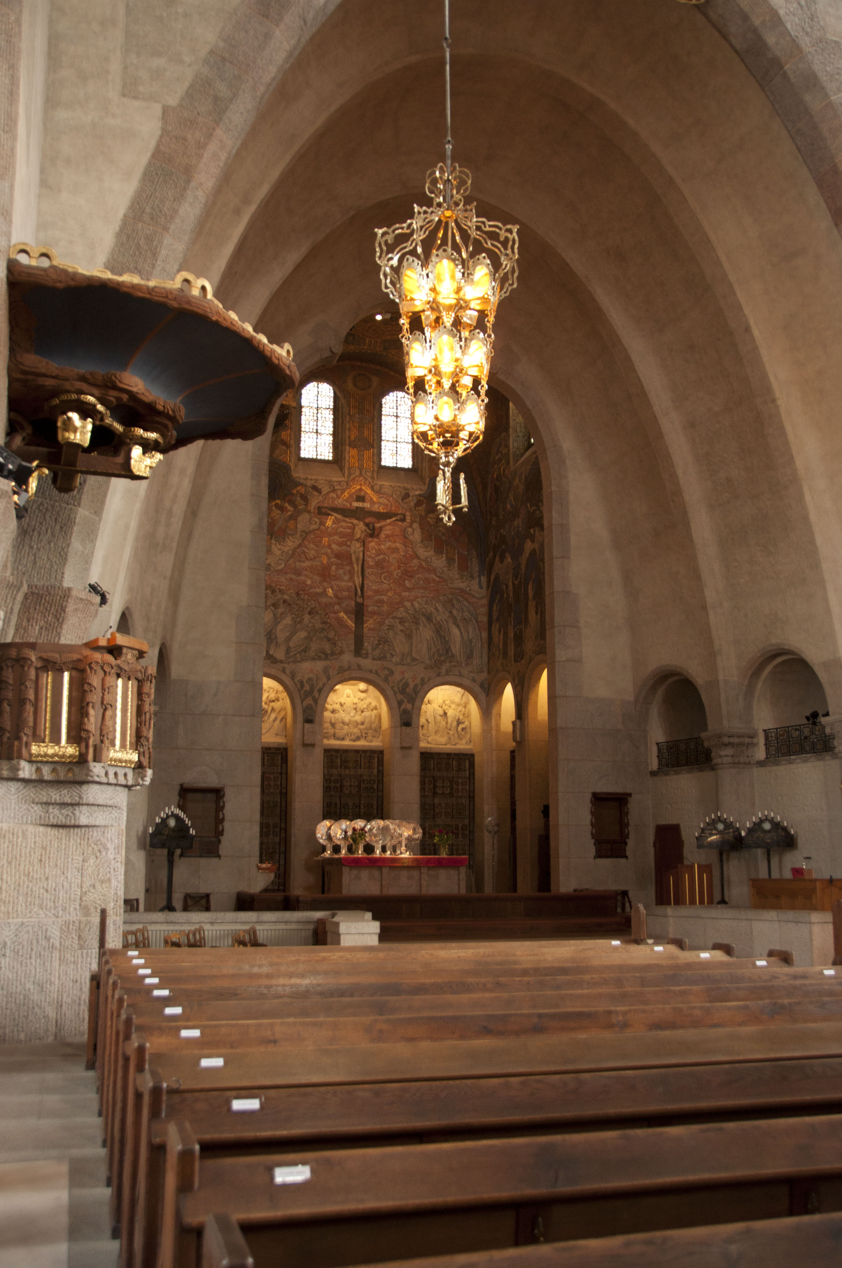 Engelbrektskyrkan interior